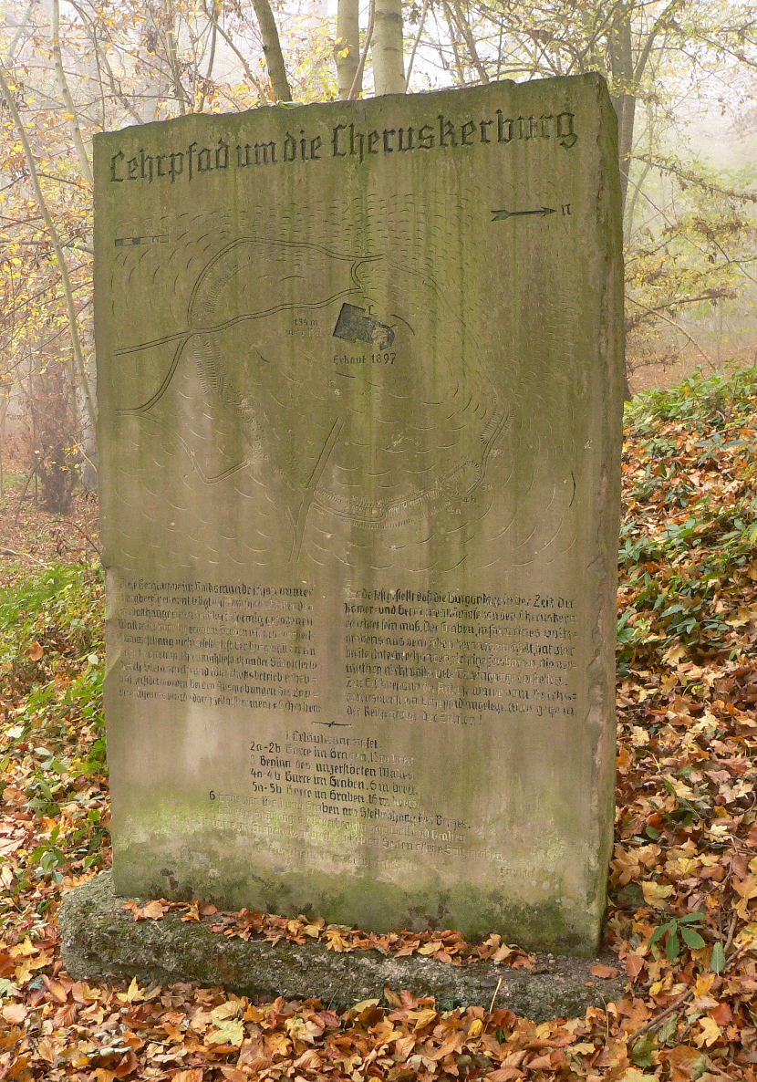 Stein auf dem Gehrdener Berg zur Cherusker Burg